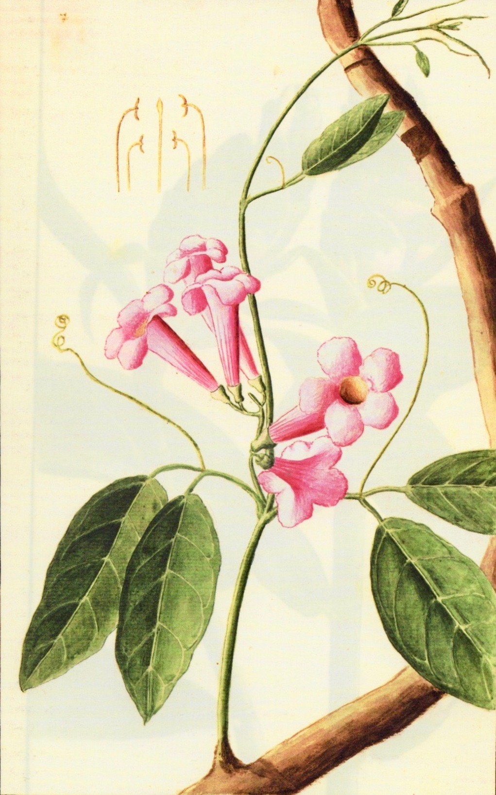 Antonio González (französisch Antoine Gonzalès, aus Madrid, Lebensdaten unbekannt): Tabebuia aff. heterophylla, auf den Antillen heimische Art der Trompetenbaumgewächse (Bignonaceae), Puerto Rico. Aquarell aus dem Tagebuch von Kapitän Nicolas Baudin (1754–1803) von dessen Antillenexpedition (1796–1798) im Auftrag des Direktoriums der Französischen Republik. Muséum national d’histoire naturelle, Paris.